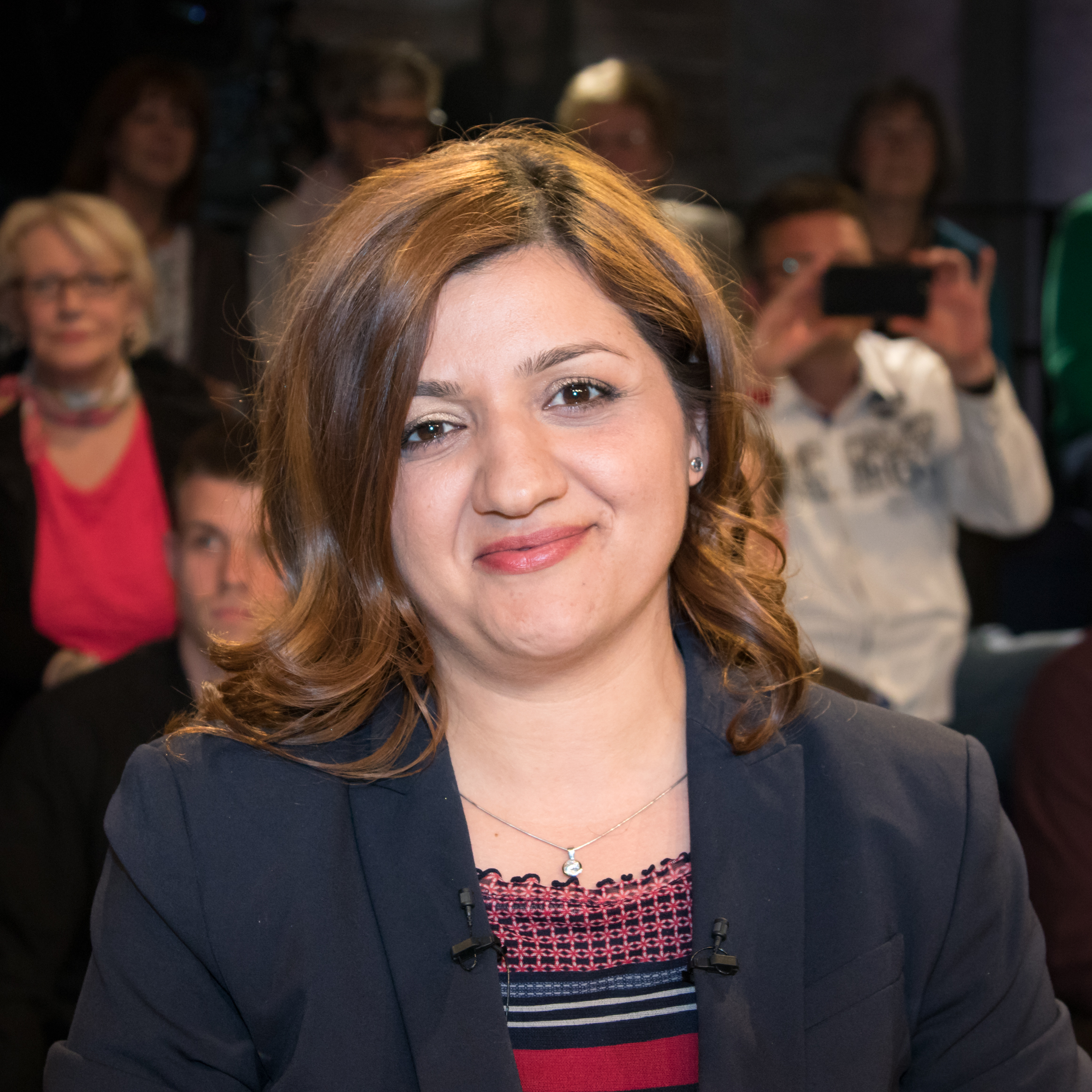 WDR-Sendung Wahl-Arena, Donnerstag, 4. Mai 2017 zur NRW-Wahl: Özlem Alev Demirel